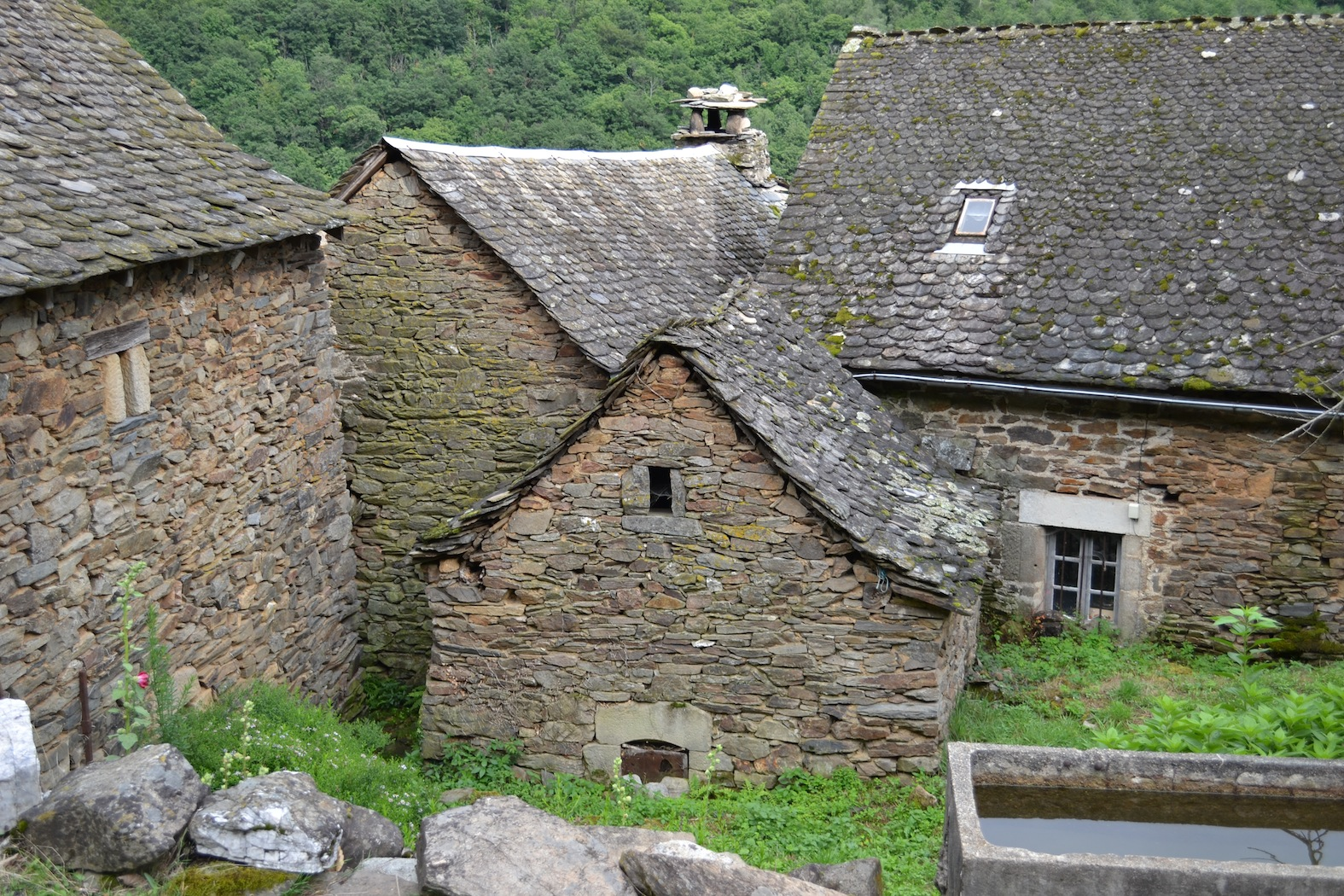 les gandalgues habitat traditionnel